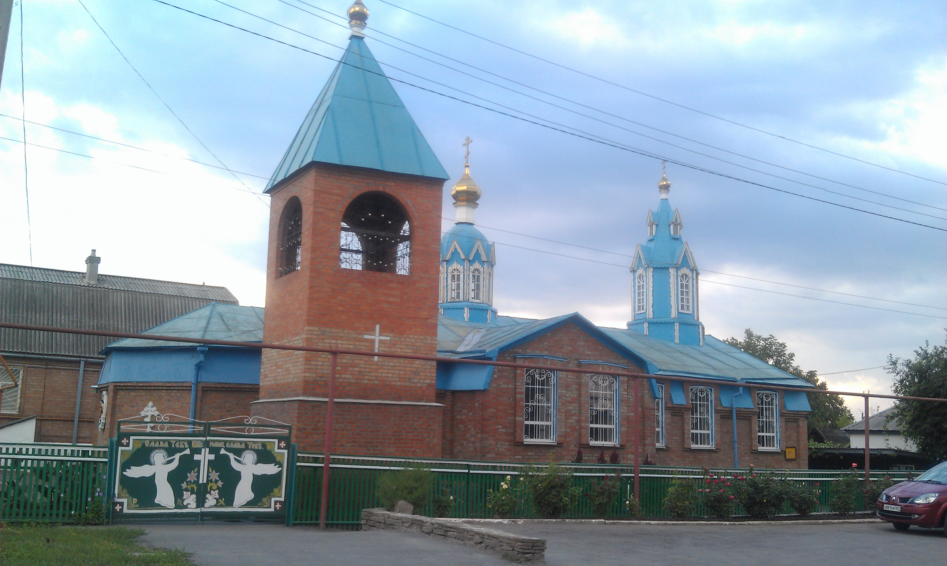 Церковь михаила архангела (Ростовская область, Шахты, р. п. каменоломни)